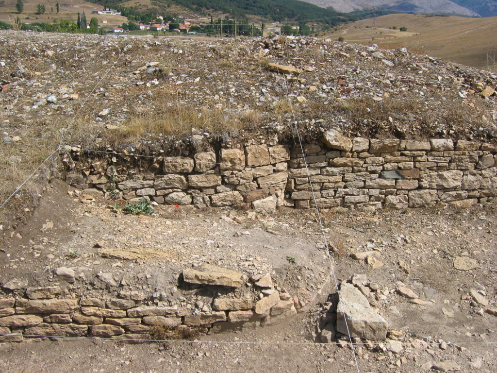 Castro de La Loma. Santibáñez de la Peña (Palencia, Castilla y León). Detalle de la puerta interior del castro cántabro de La Loma. Detalle de la rampa de subida a al adarve de la muralla. Se puede observar en la falta de continuidad de las hileras, como la puerta ha sido tapiada, ante el asedio sufrido por las legiones romanas en las guerras cántabras (del 29 al 19 A.C.). En esta parte durante las excavaciones del año 2005 se encontró un fémur humano que se correspondía con el de una persona de más de 1.90m de altura.